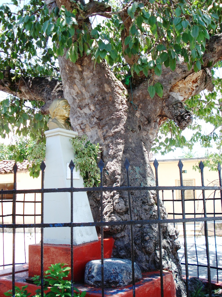 Árbol de Capire en la localidad de Paso Morelos, Guerrero donde José María Morelos descansó en 1815.